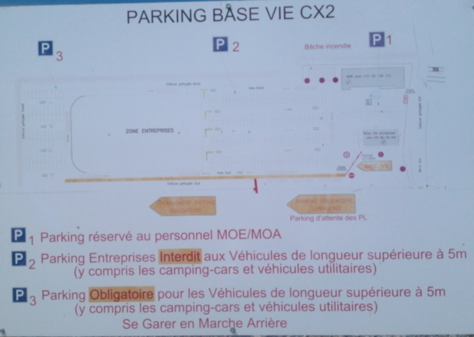 Plan des parking la base vie de Malvési.